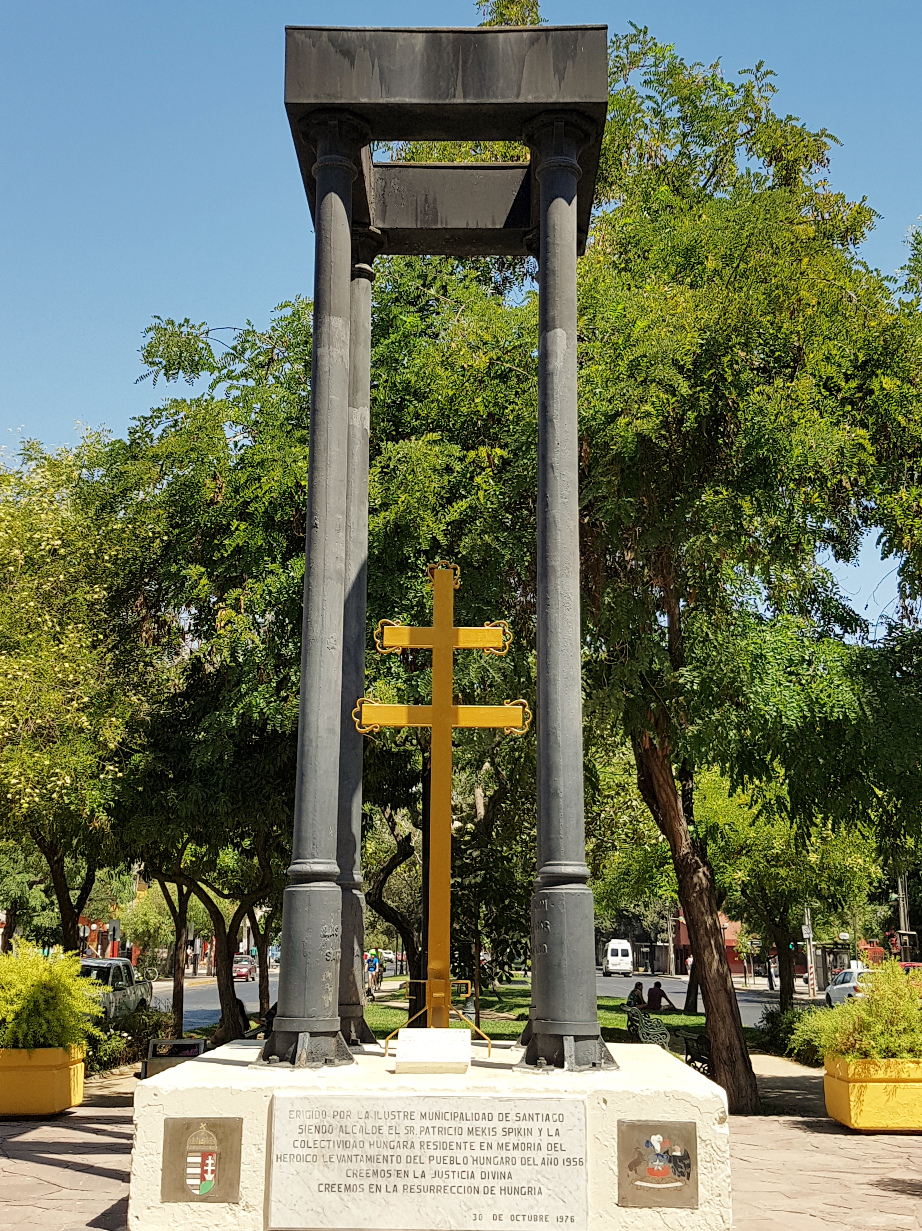 Memorial a la revolución húngara de 1956 ubicado en el bandejón central de la avenida Bustamante, entre Santa Isabel y Marín, casi frente a calle Santa Victoria; comuna de Providencia, Santiago de Chile.